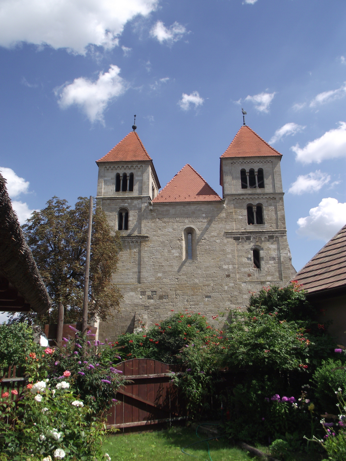 Református templom, volt premontrei prépostsági templom (Ócsa, Bercsényi u.) This is a photo of a monument in Hungary. Identifier: 7192